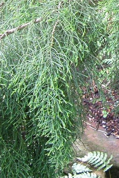 feuillage de pin_Huon Lagarostrobos franklinii